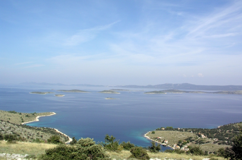 Žut, Srednji kanal, Croatia